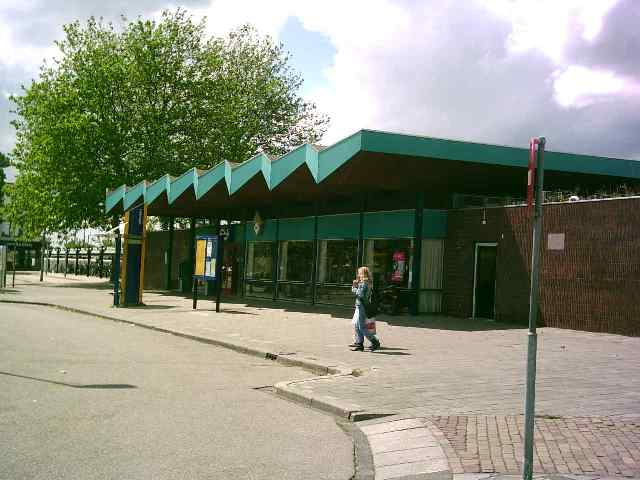 Het station in Gorinchem. De foto is eerder onder mijn eigen naam gepubliceerd op Gorinchem